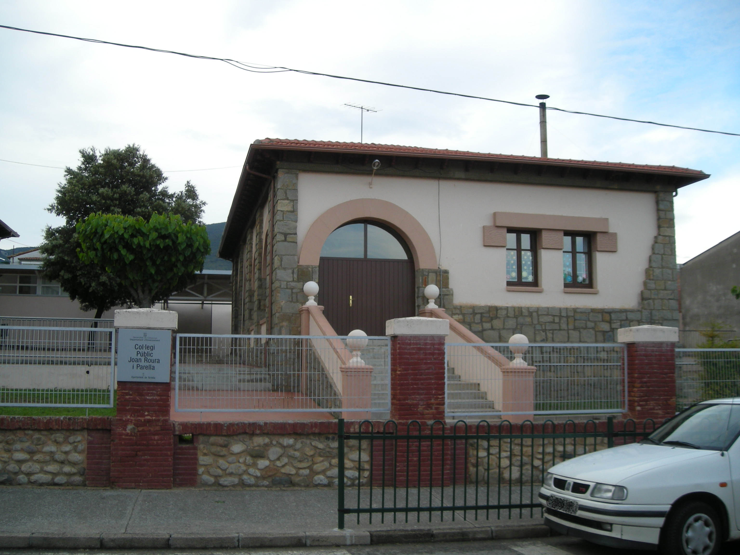 CEIP Joan Roura i Parella de Tortellà